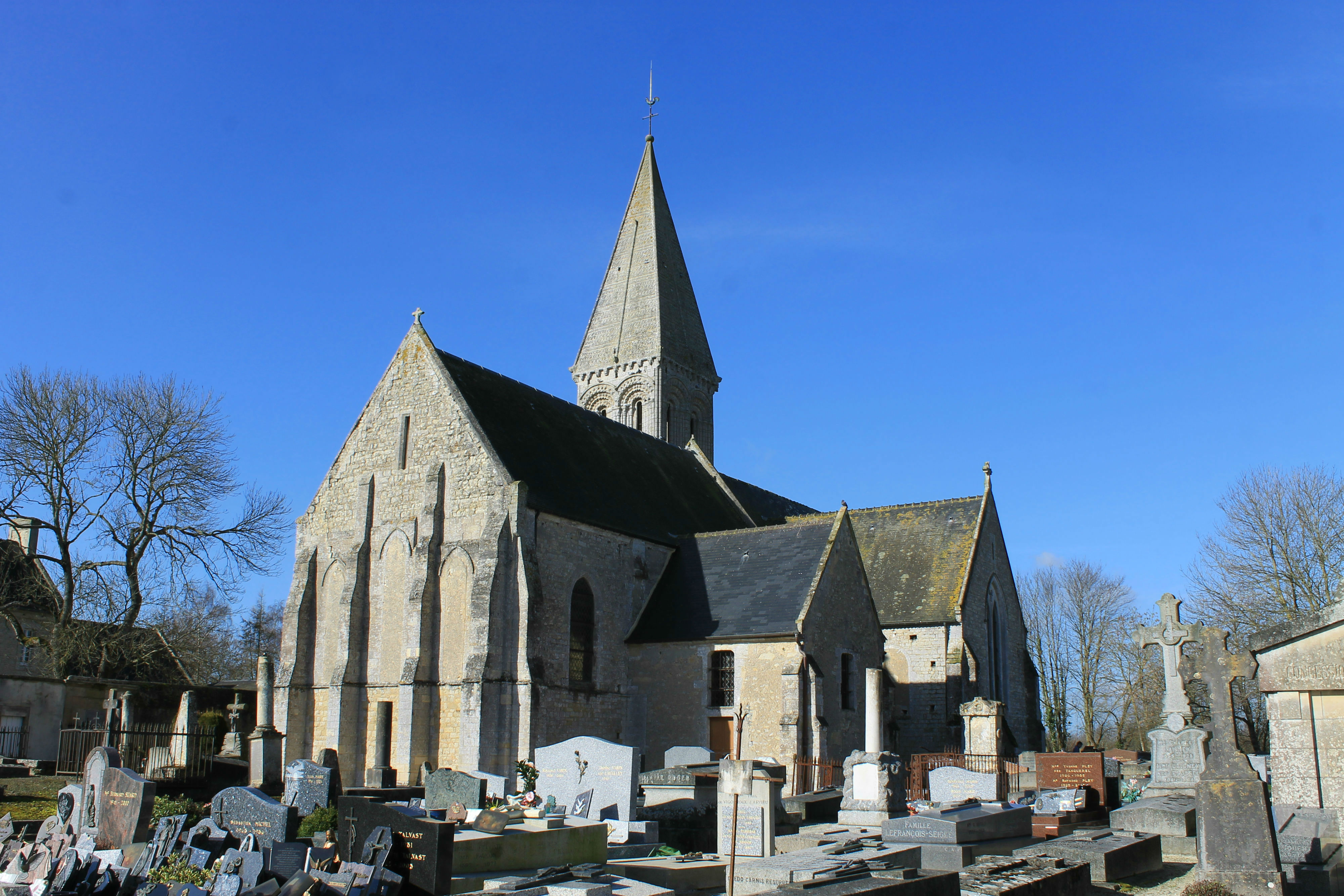 Église Saint-Loup de Saint-Loup-Hors Calvados